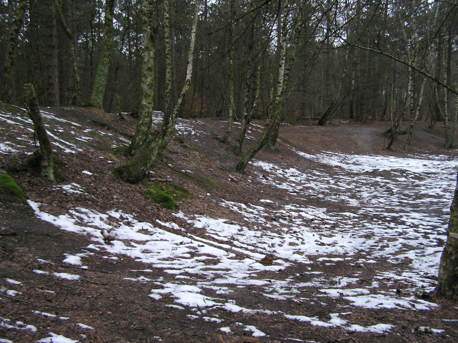 Ehemalige Startanlage für Raketentests im Wernerwald bei Cuxhaven